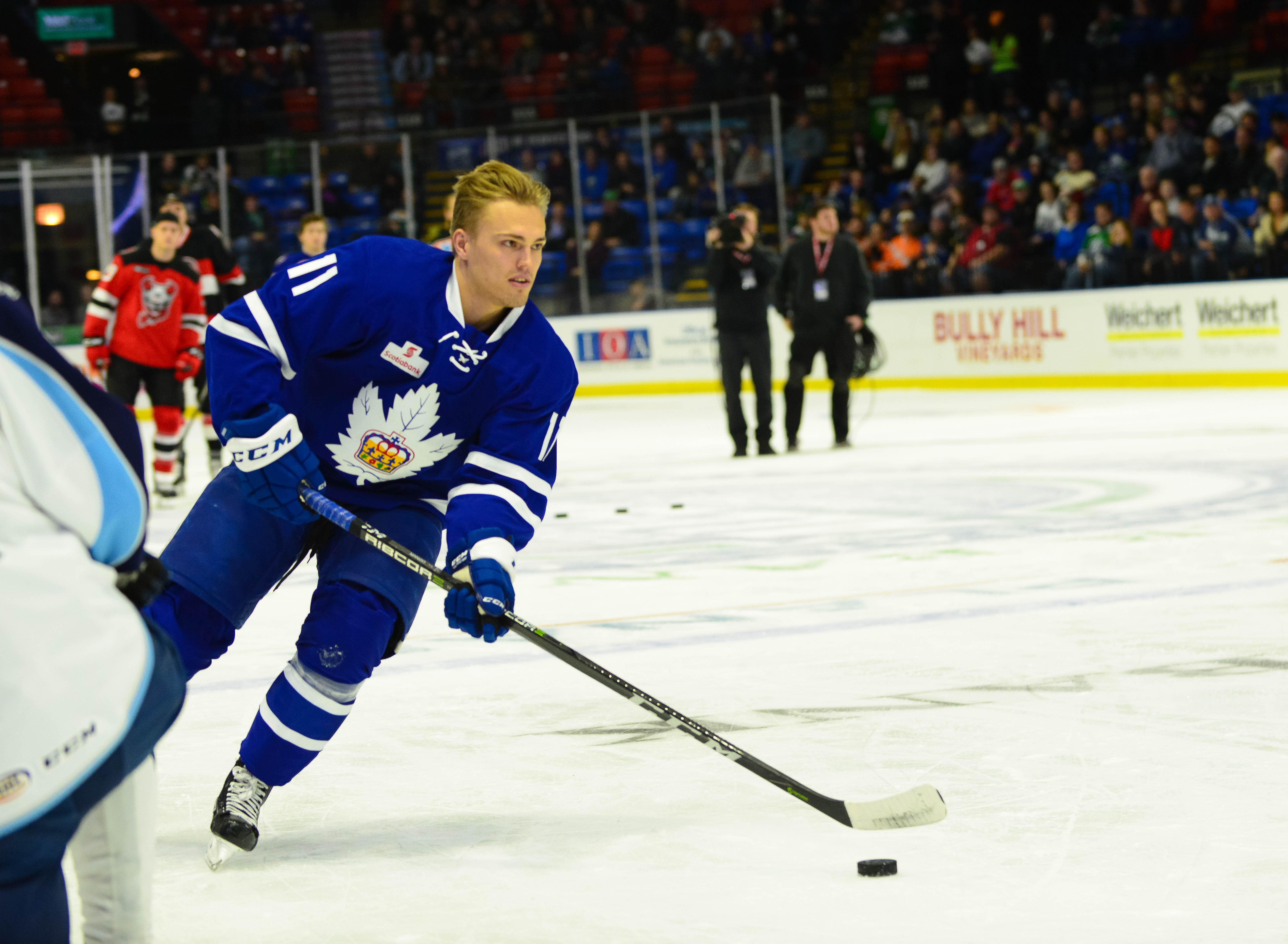 (Bryan Peck/ AHL)